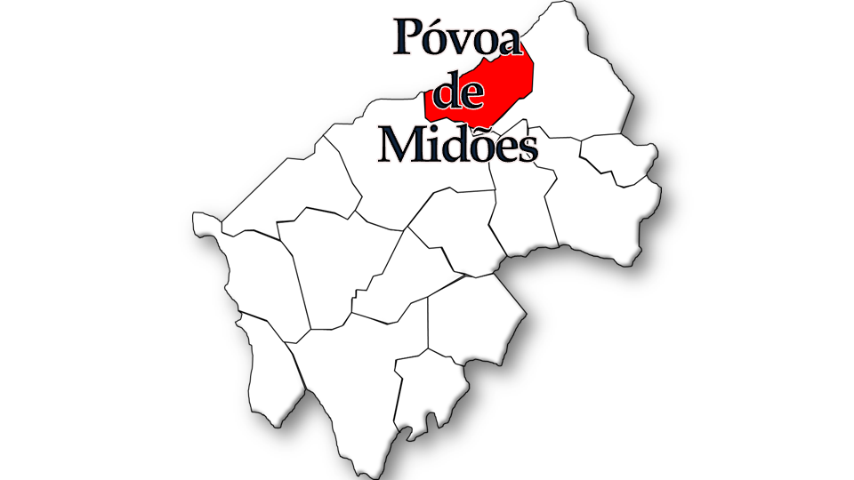 População